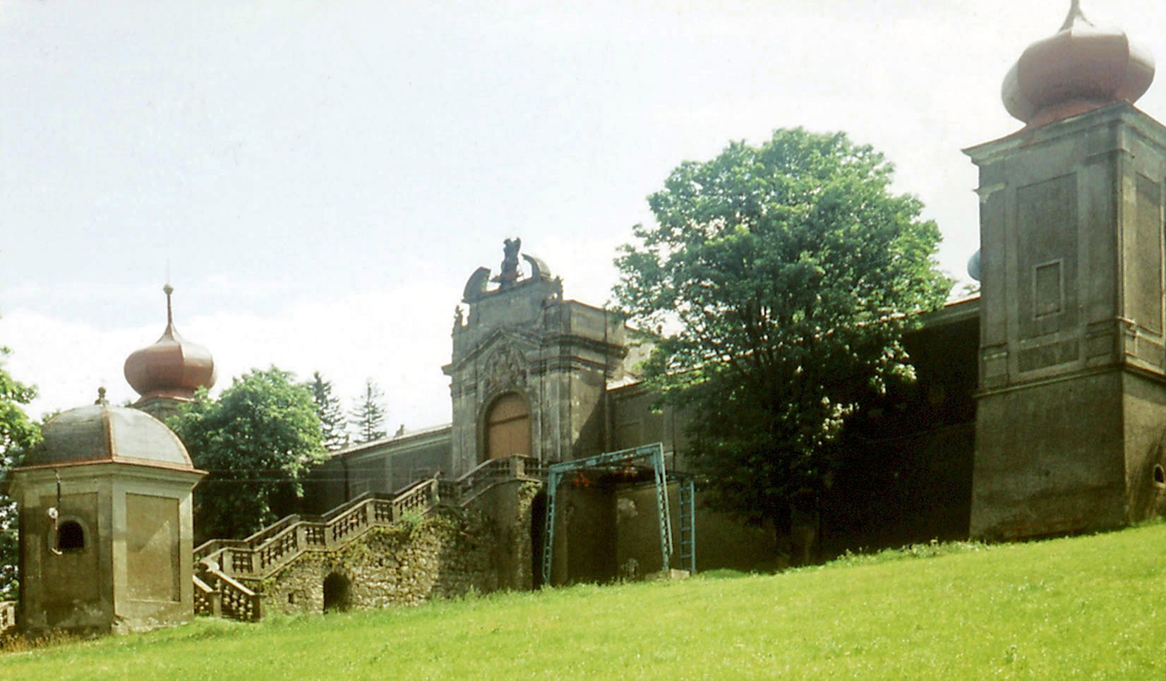 Auf dem Muttergottesberg bei Grulich 1976